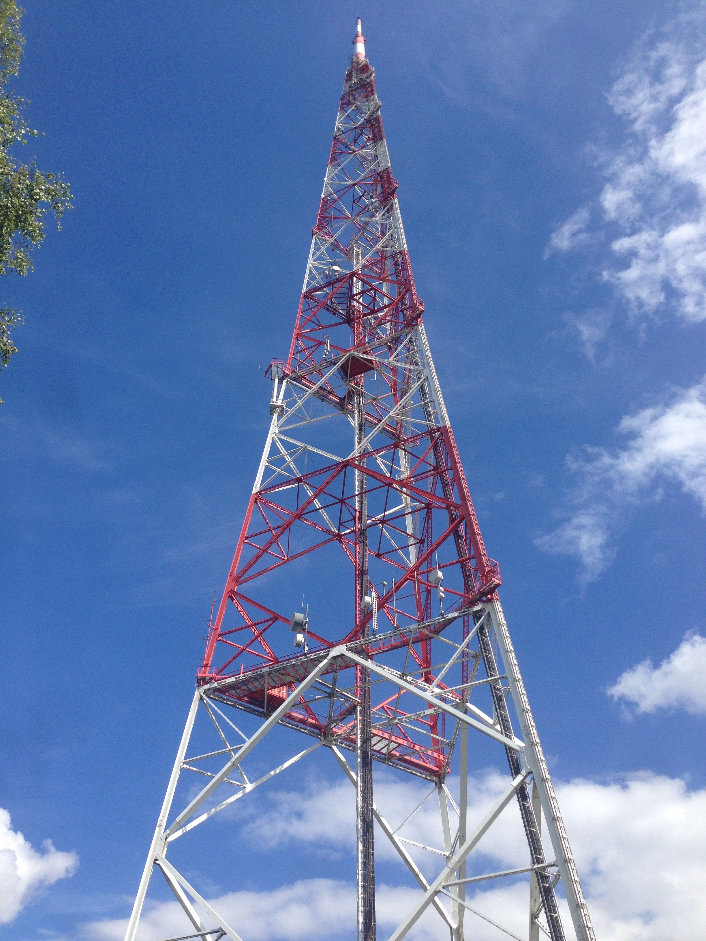 Sender Düdelingen in Luxemburg